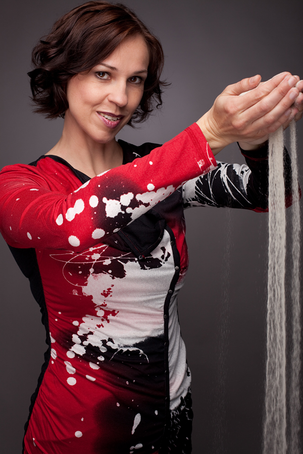 Portrait Katrin Weißensee